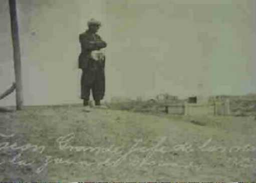 última foto de Facón Grande, horas antes de ser fusilado por Varela